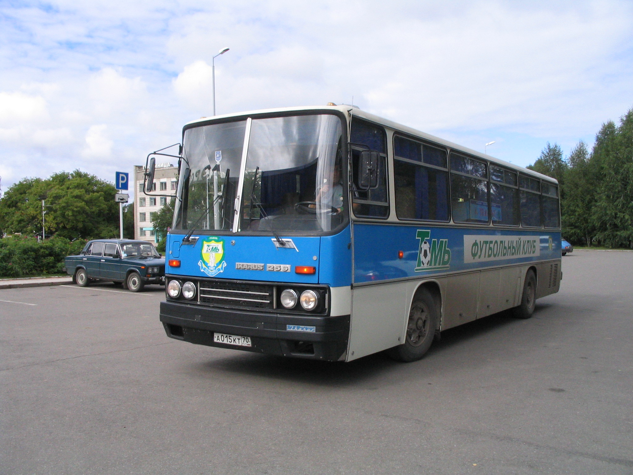 Tom Tomsk football club, Ikarus 256, автобус дублёров Томи